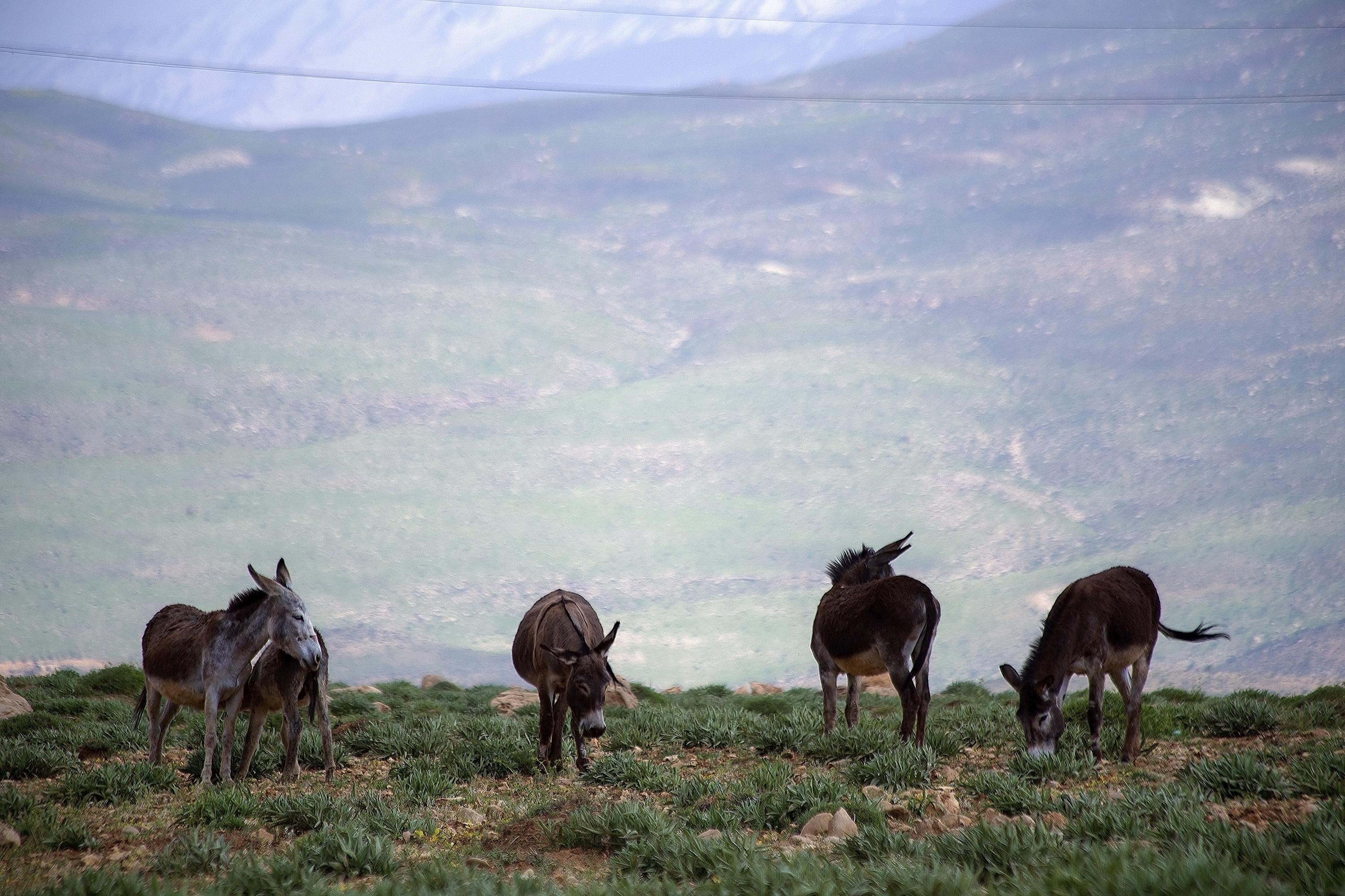 روستای خفر جنوبی‌ترین روستای پادنای وسطی است که در ۸۴ کیلومتری شهر سمیرم در استان اصفهان قرار گرفته است. این روستا در دامنه بلندترین قله دنا (قاش مستان) بر روی اراضی پر شیب ساخته شده و یکی از بهترین مسیرهای کوهنوردی قله‌های دنا می باشد. روستای خفر دارای جمعیتی حدود ۱۶۰۰ نفر در زمستان و ۳۰۰۰ نفر در تابستان است. به دلیل واقع شدن این روستا در دامنه رشته کوه دنا و آب و هوای کوهستانی منطقه، انواع گونه‌های گیاهی و جانوری در آن دیده می‌شود. وجود ۱۴ قله بالای ۴۰۰۰ متر (قاشمستان بلندترین قله رشته کوه دنا با ارتفاع ۴۴۳۵ متر در نزدیکی این روستا قرار دارد.)، همچنین انواع یخچال‌های طبیعی، آبشارهای متعدد و رودخانه‌های جاری شده از یخچال‌ها، چشم اندازهایی زیبا در این ناحیه بوجود آورده‌است.